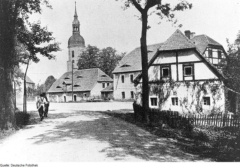 Original image description from the Deutsche Fotothek Großdubrau-Klix. Mühle, altes Gebäude (Bildmitte), aus: Lüdinghausen: Sächsische Oberlausitz, 1922